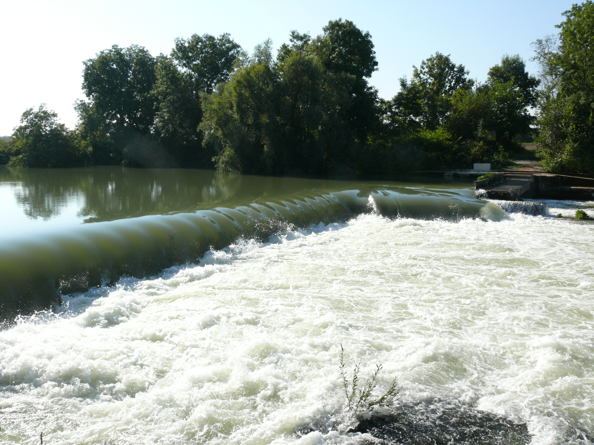 Usine élévatoire de Trilbardou (Seine-et-Marne - Île-de-France - France) : Barrage sur la Marne